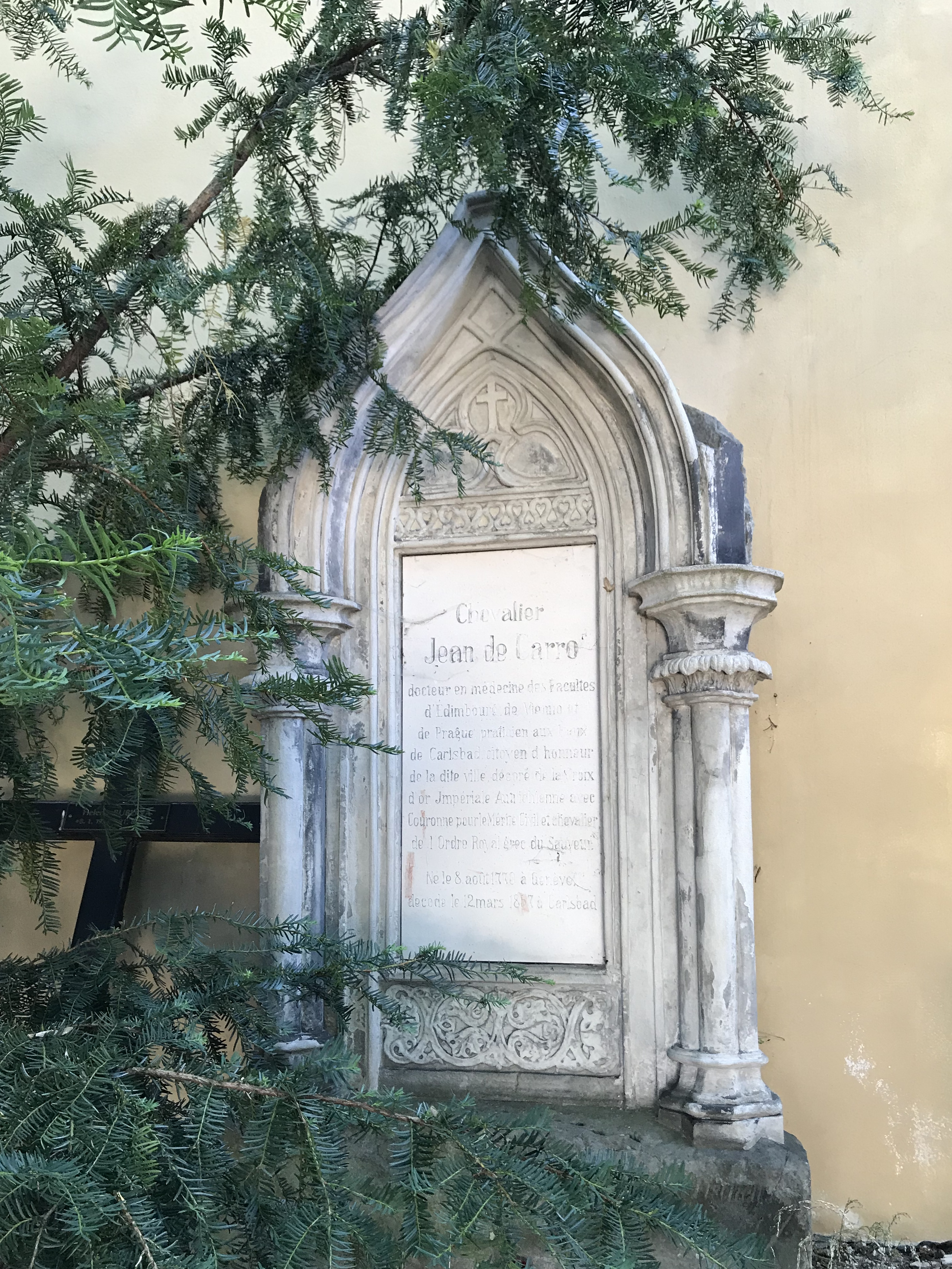 Hrob Jeana de Carro v Karlových Varech v Mozartových sadech u zdi kostela sv. Ondřeje